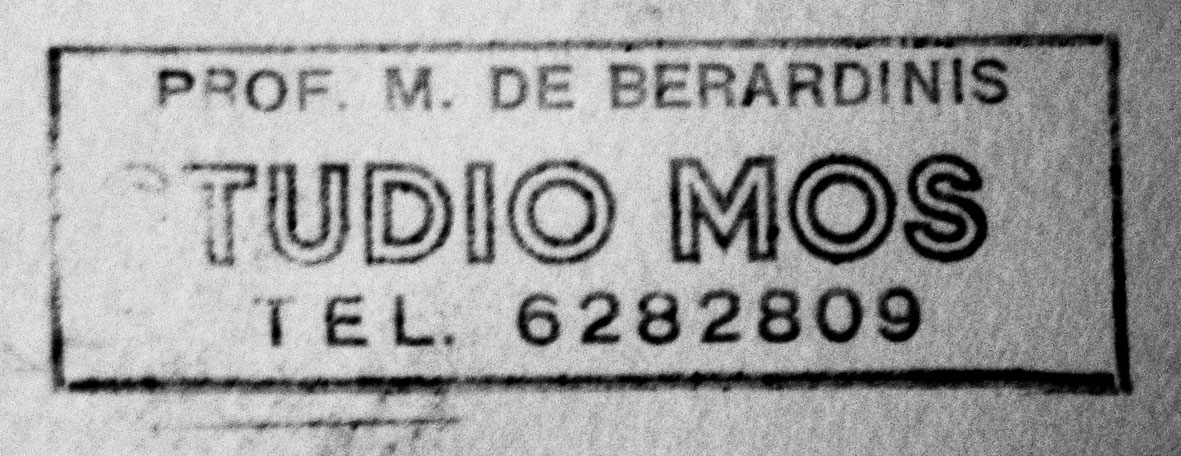 Tampon du Studio MOS : Mario De Berardinis, peintre italien d'affiches de cinéma 60-70